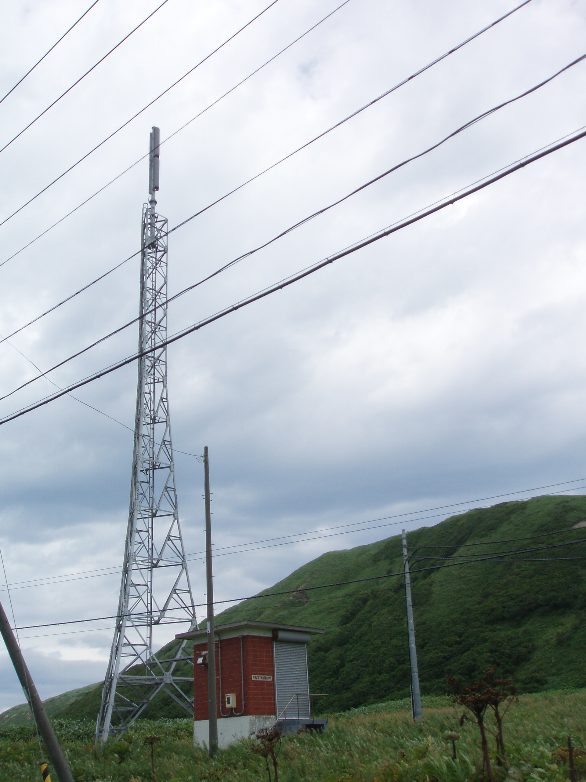 西稚内中継局 HBC・STV・HTB・UHB送信設備